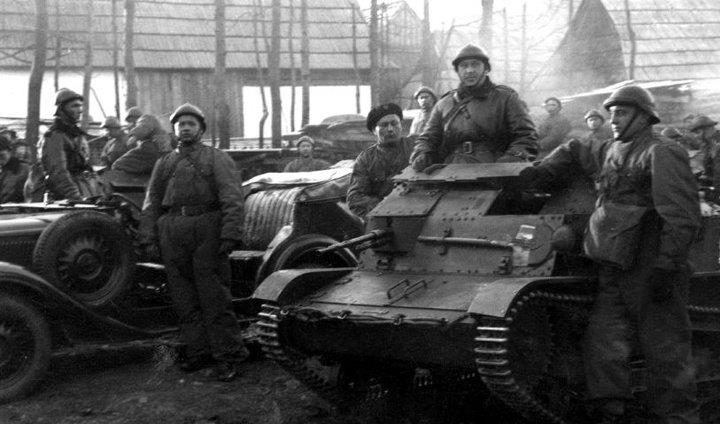 "Die Schwarze Brigade" Rzeszów